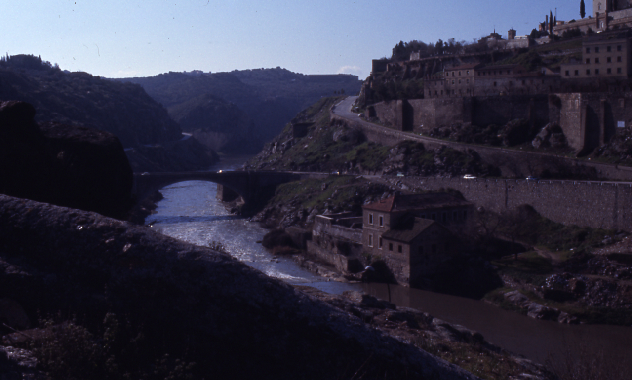 Servizio fotografico : Toledo, 1980 / Paolo Monti. - Foglio: 1, Fotogrammi complessivi: 20/20 : Diapositiva, sviluppo cromogeno/ pellicola ; 35 mm. - ((Sullo chassis della diapositiva n. 1 iscrizione manoscritta: "Toledo". - Fonte: Rubrica di Paolo Monti: Diapositive 24x36mm (1948-1982), presso Archivio Paolo Monti. Rubrica con elenco soggetti e numeri di inventario (da 1 a 1000) corrispondenti ai fogli a tasche in pvc in cui sono contenute le diapositive.